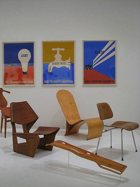 @MOMA